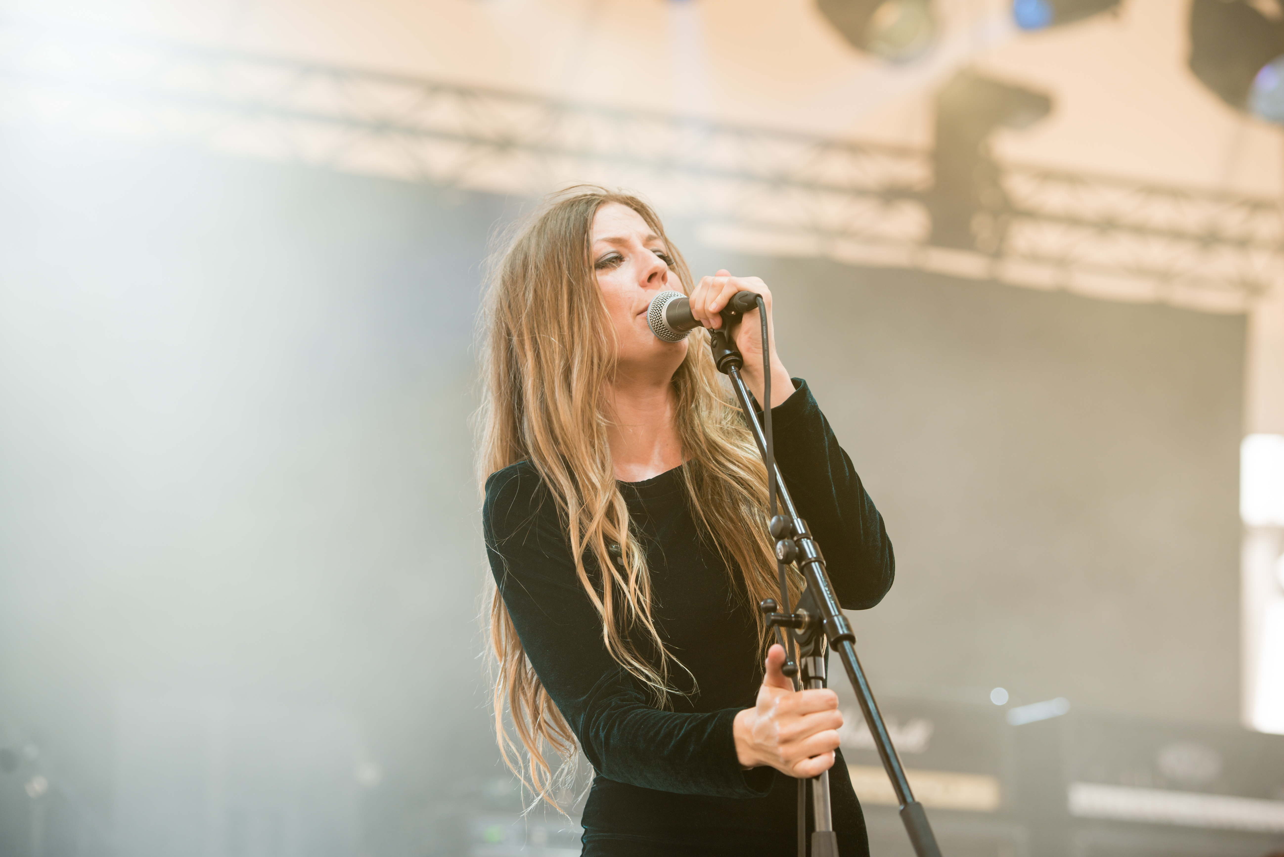 'Rock Hard Festival 2014 - Gelsenkirchen': 'Blues Pills'